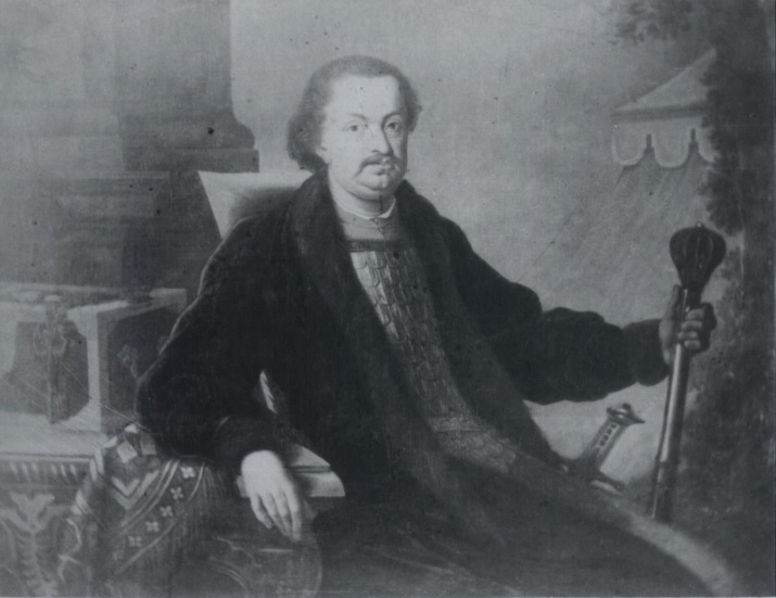 Portret Marcina Zamoyskiego, podskarbiego wielkiego koronnego